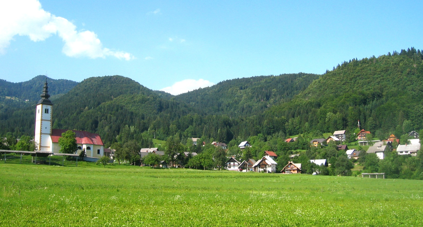 Jereka, village in Slovenia